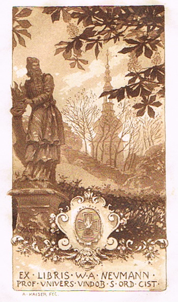 Ex Libris aus der Bibliothek des Zisterzienserpaters Wilhelm Anton Neumann. Er war Bibelwissenschaftler, Kunsthistoriker und Rektor der Universität Wien. Siehe Wiki-Artikel über ihn.